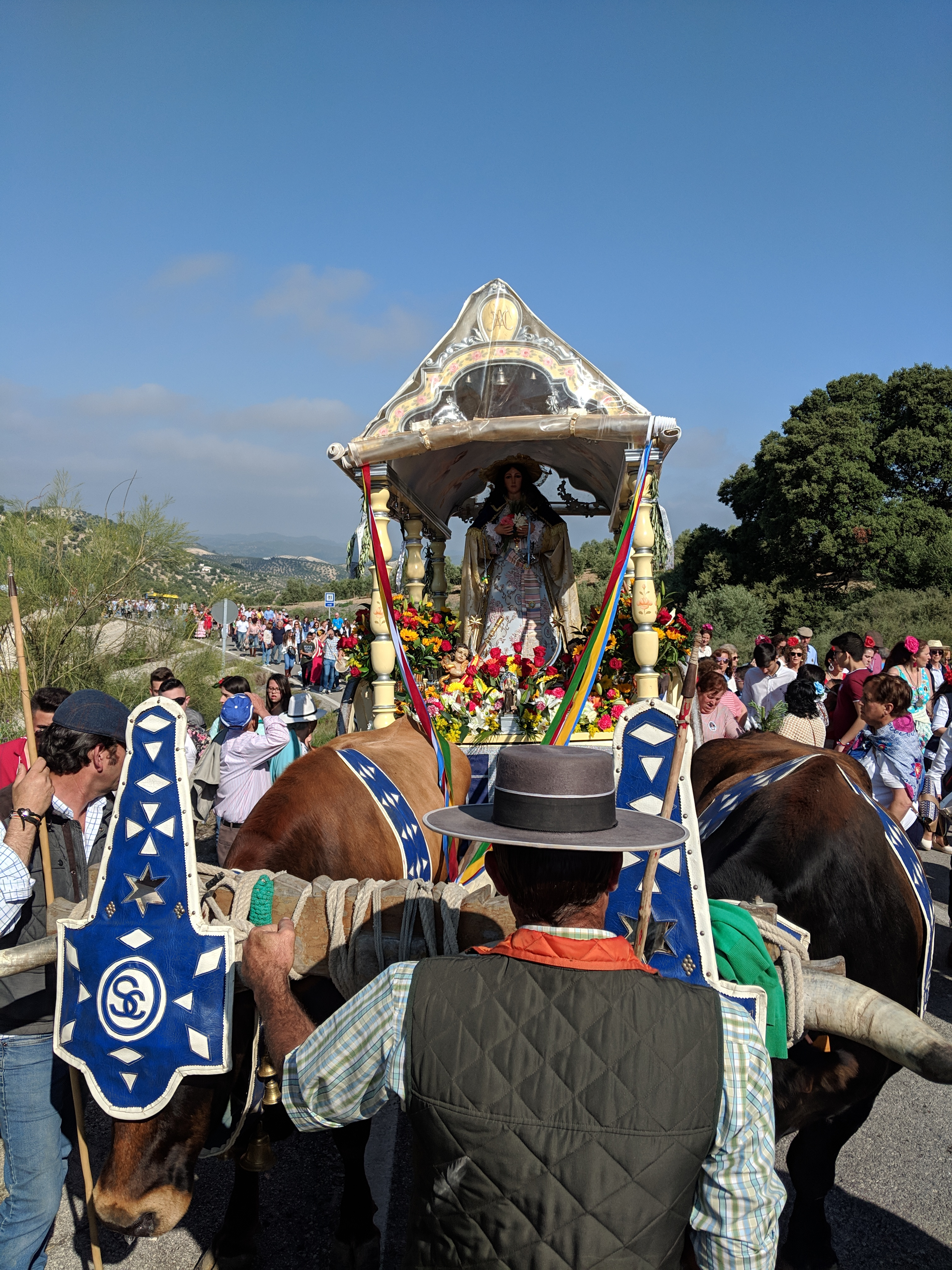 Romeria Pruna